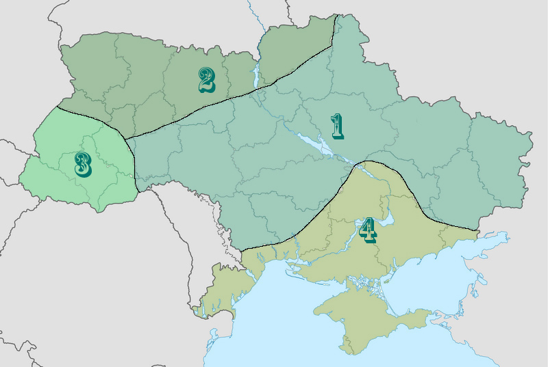 Антропологічна диференціація українців за комплексом морфо-фізіологічних характеристик. Антропологічні зони: 1 - центральна 2 - північна 3 - західна 4 - південна Складено С.П. Сегеда згідно матеріалів зібраних 1970-1999 р. Розміщено зокрема в Сегеда С. «Антропологічний склад українського народу: етногенетичний аспект» Видавництво імені Олени Теліги 2001 256 ст. (на 102 ст.) ISBN: 966-7601-34-Х